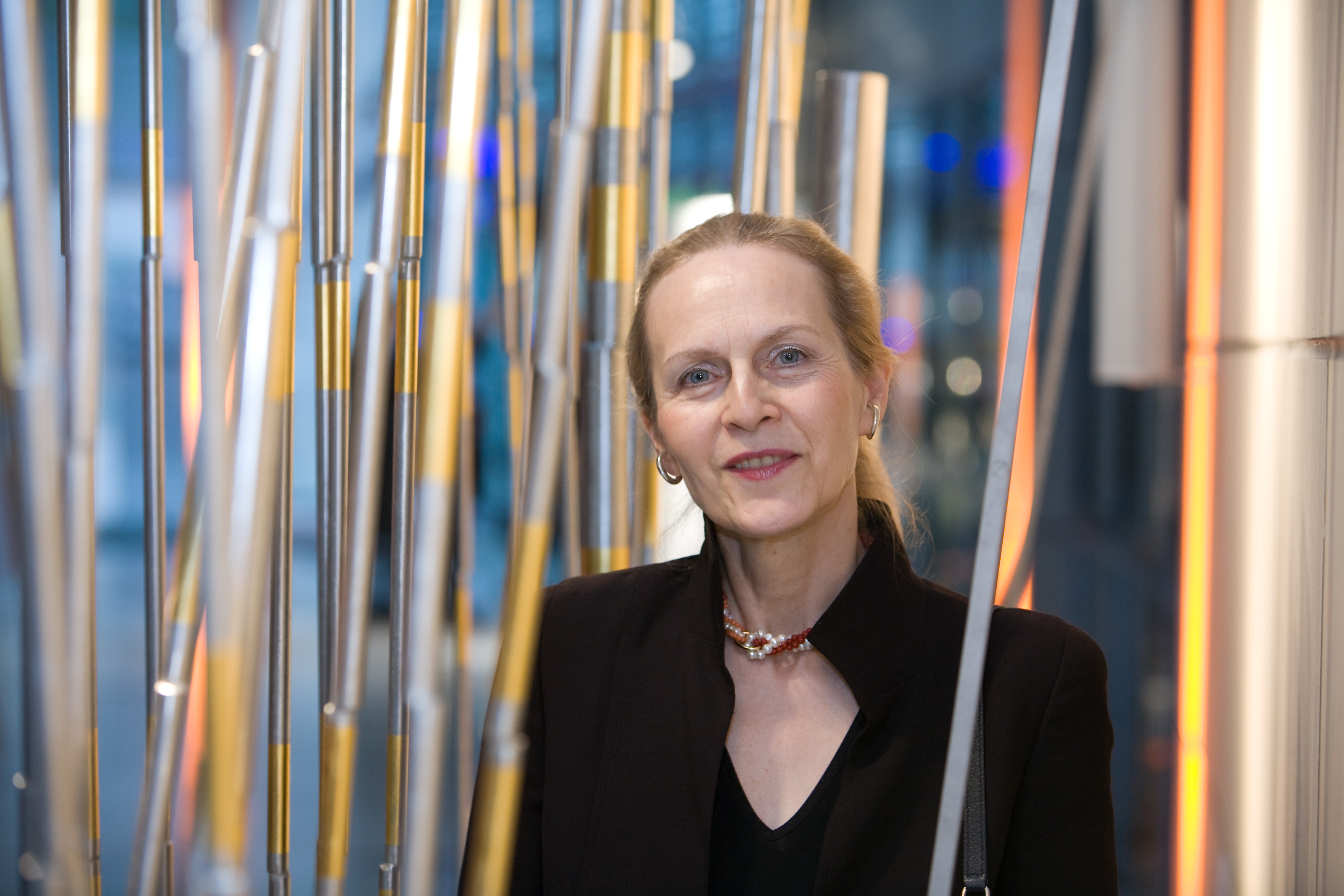 Beate Schroedl-Baurmeister (Porträt), Foto Günter Lintl